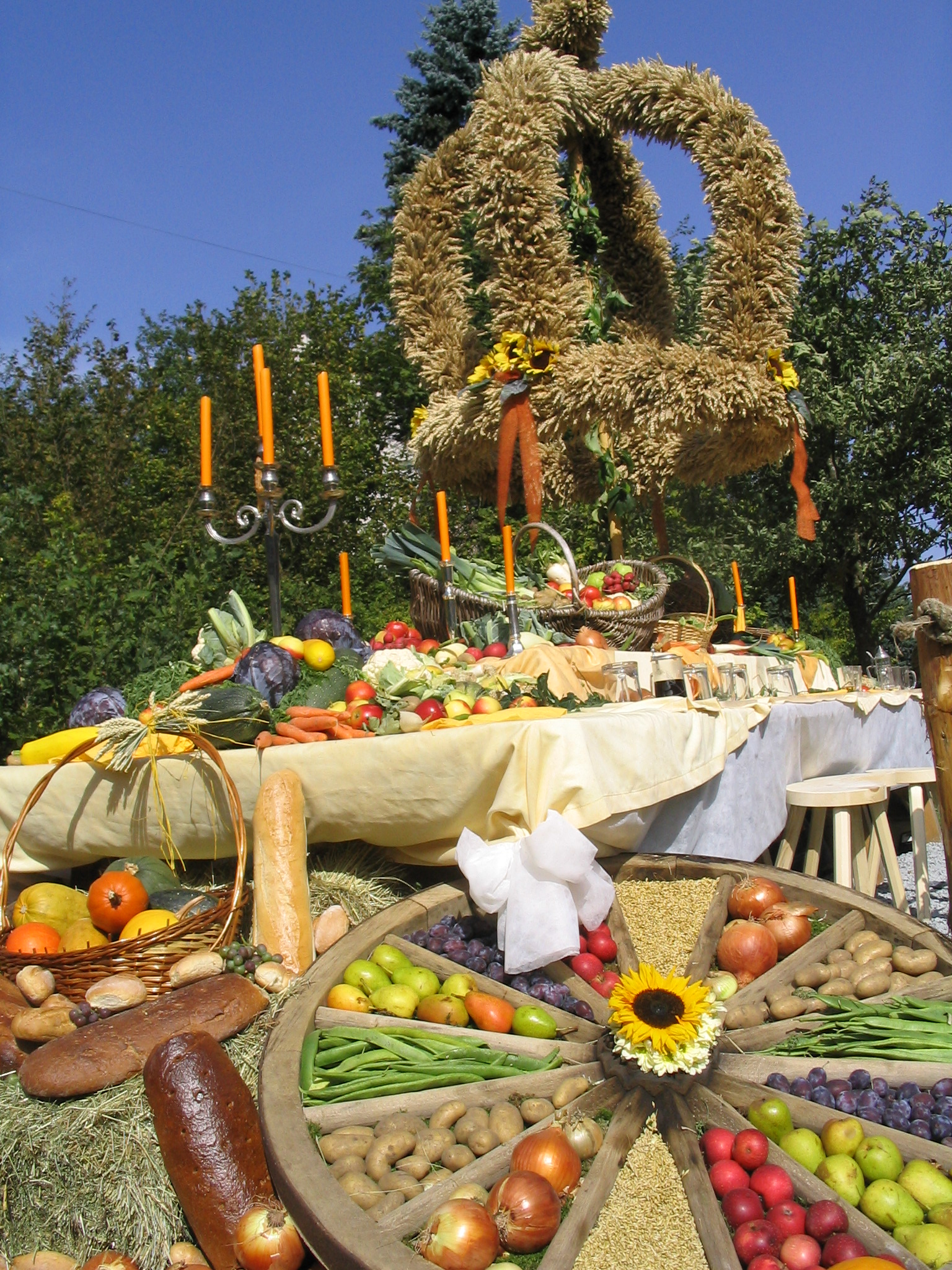 Hier eine Aufnahme vom prächtigen Erntedankwagen mit der Erntedankkrone und vielen schönen Gemüsesorten und Früchten aus Feld und Garten.